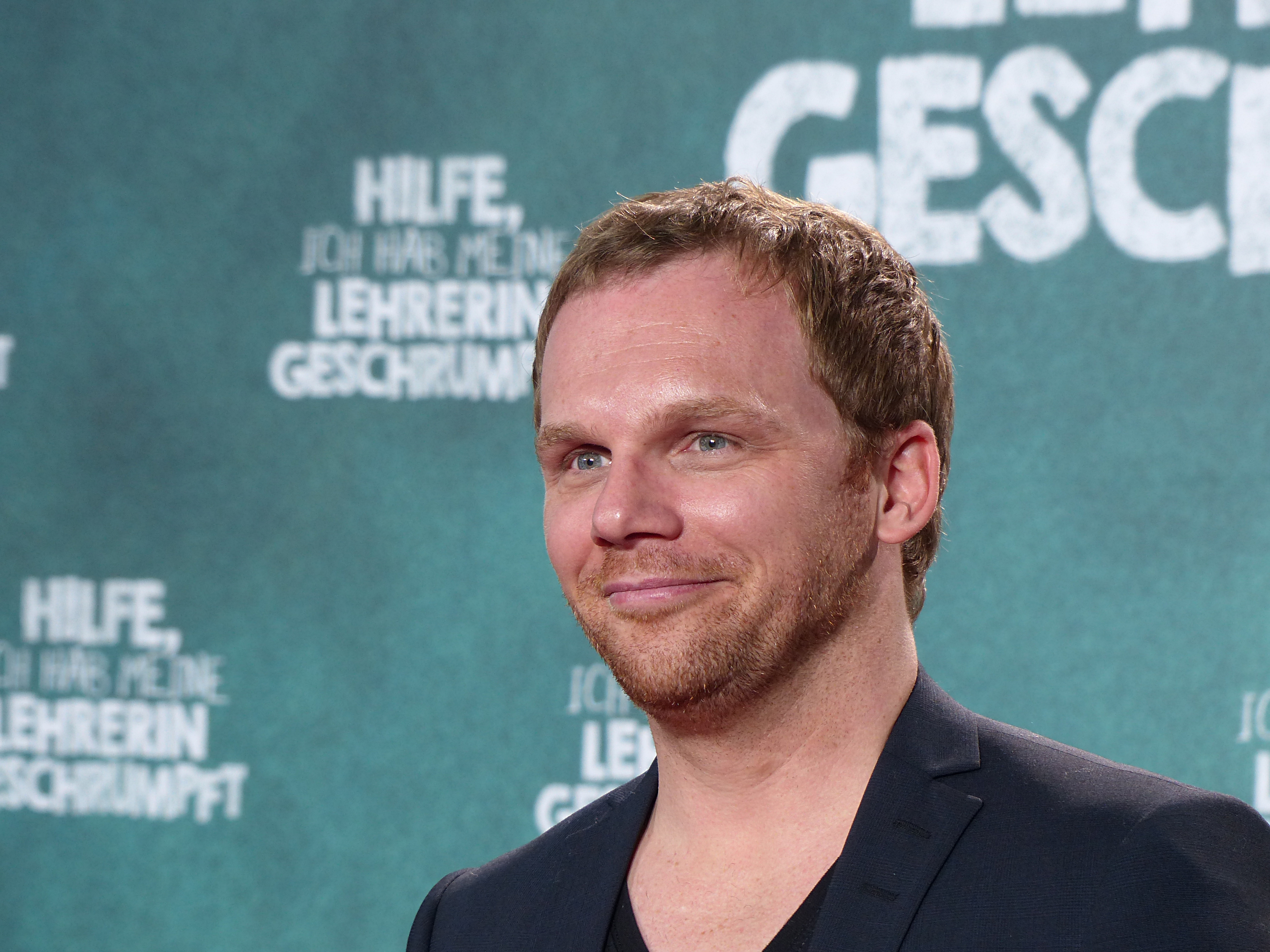 Ralf Schmitz bei der Premiere von "Hilfe, ich habe meine Lehrerin geschrumpft", im Dezember 2015.